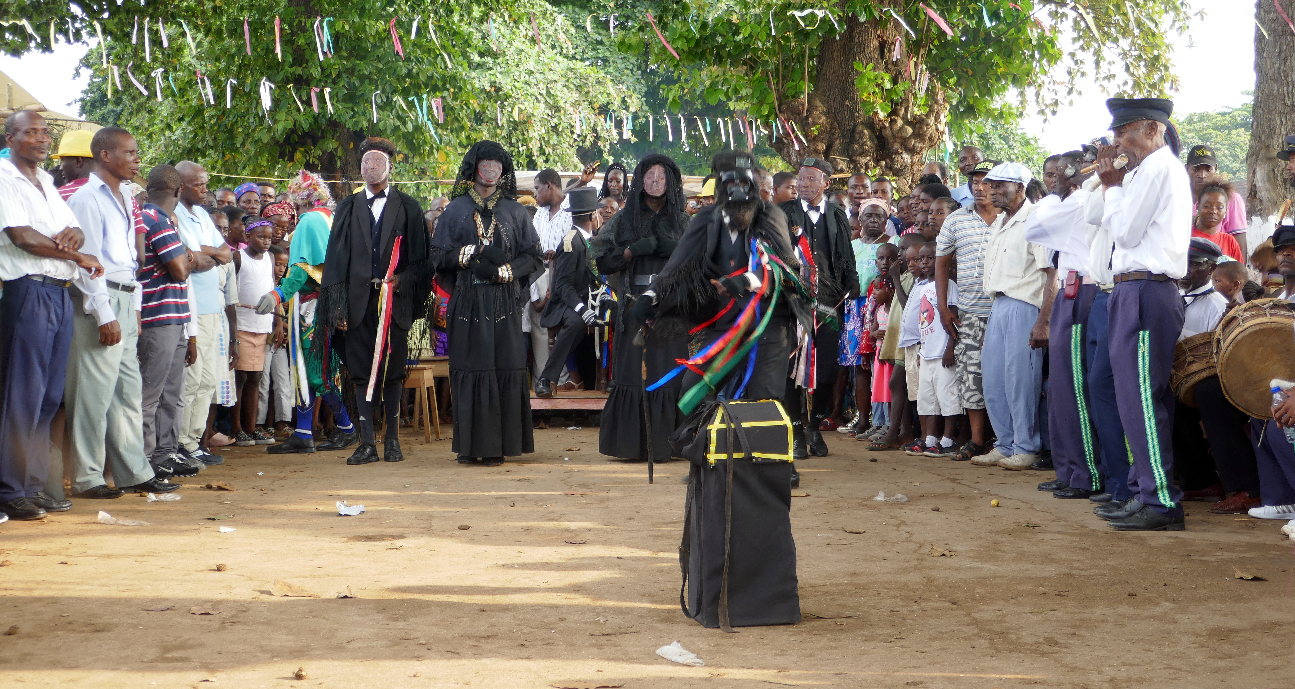 Tchiloli représenté devant l'église São Pedrão de São Tomé à l'occasion de la fête patronale. Le tchiloli est une forme théâtrale, musicale et dansée créée au XVIe siècle, jouée par des pêcheurs et des paysans. Traditionnellement elle met en scène la seule pièce du répertoire, La tragédie du marquis de Mantoue et de l'empereur Charlemagne". This is an image with the theme "Play" from: Sao Tome and Principe